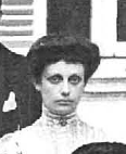 Retrato famliar de los Condes de Caserta y su familia